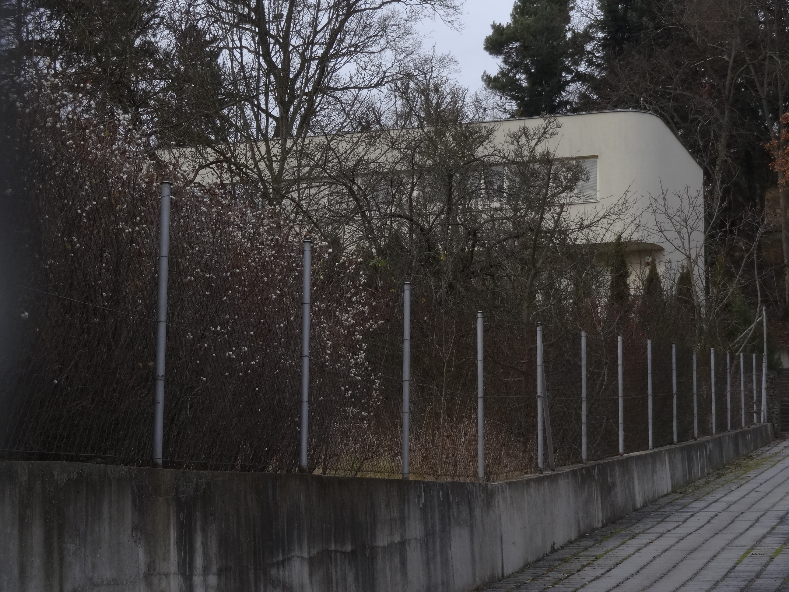 Fričova vila, Na lysinách 208/15, Hodkovičky.